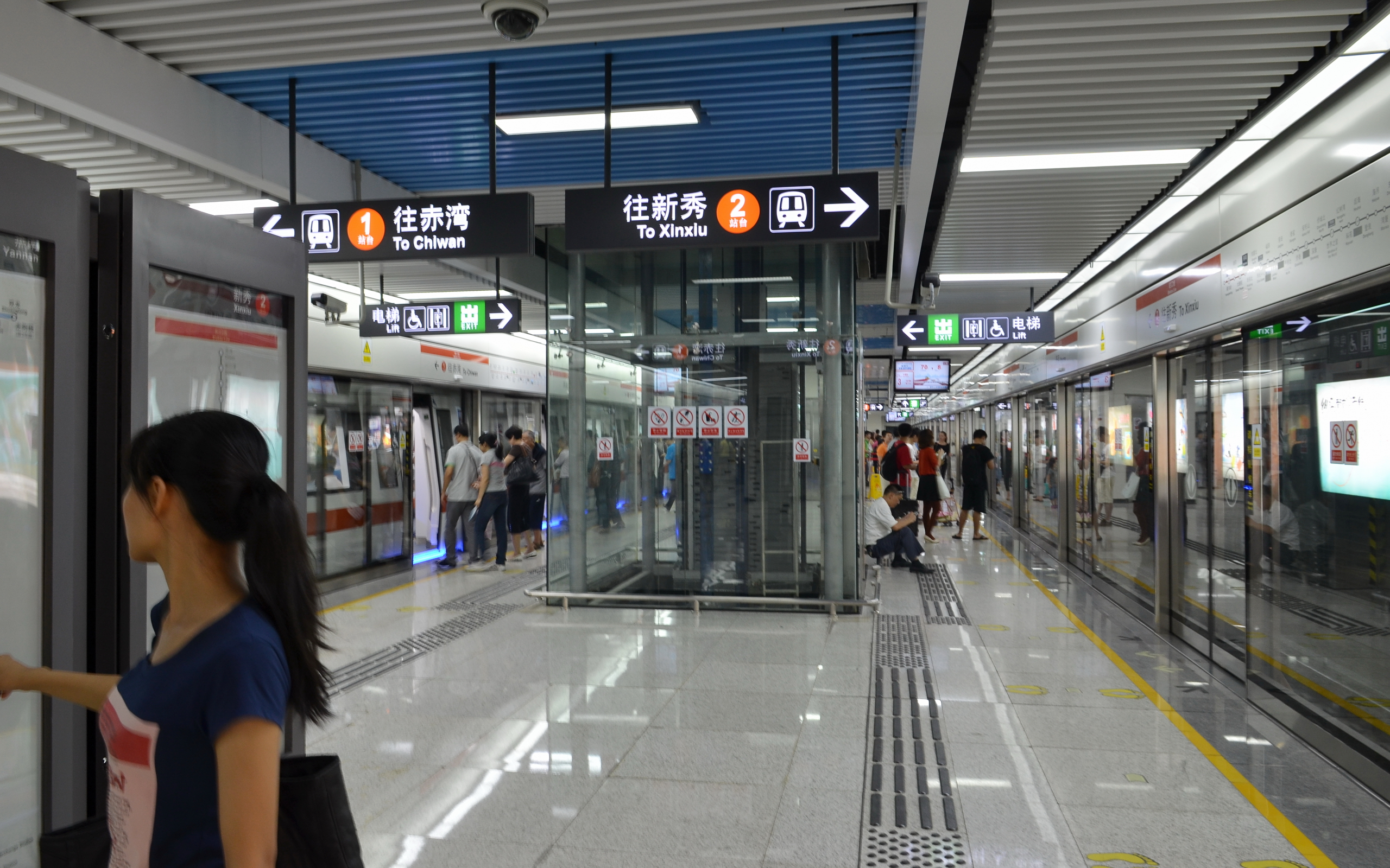 深圳地铁蛇口线燕南站无柱站台